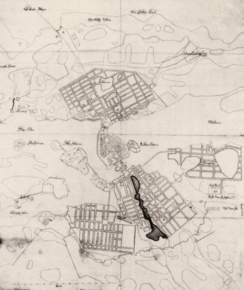 "Grundris der Schwedischen Residenz", norr är neråt